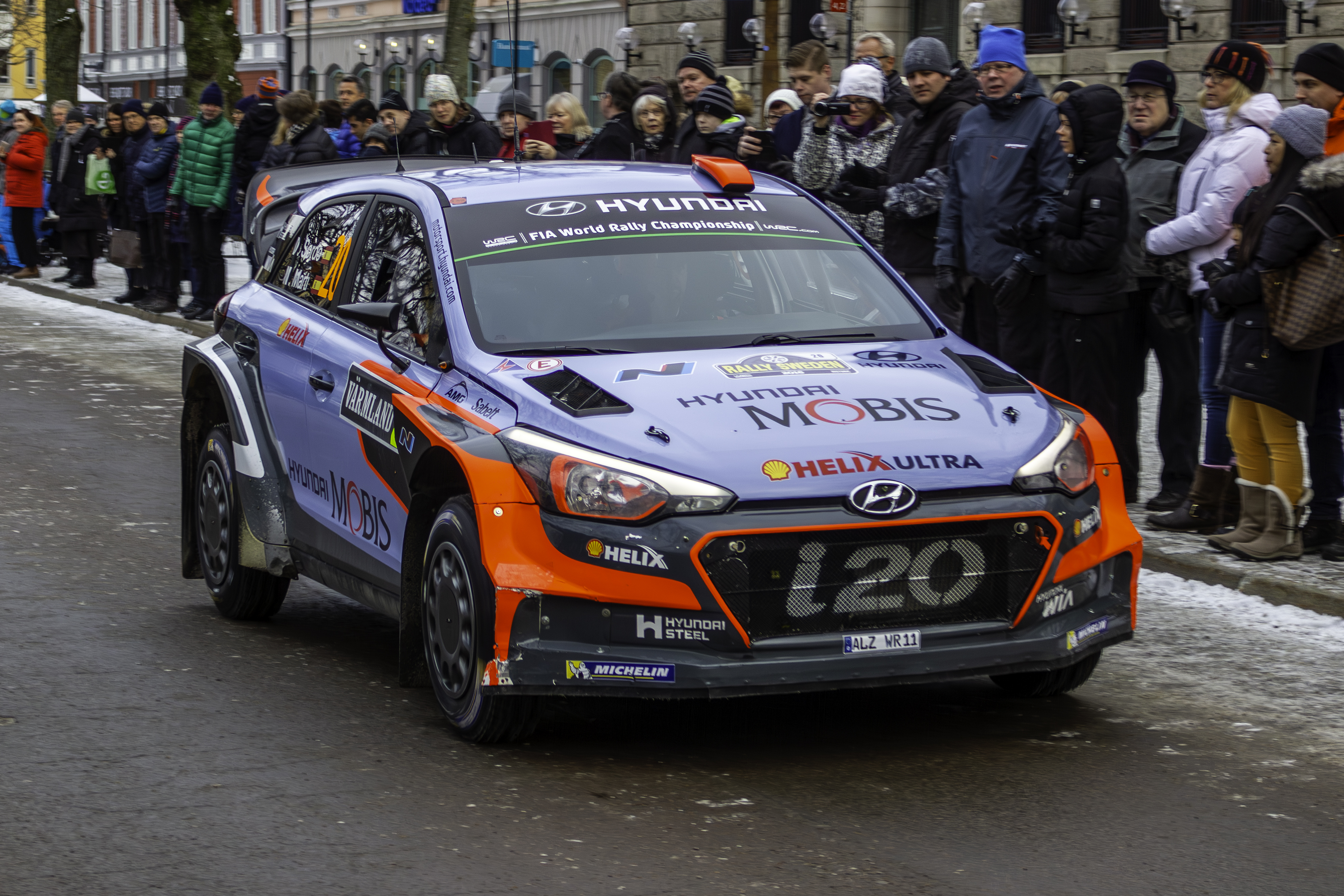 Hyundai i20 WRC de Dani Sordo en Karlstad durante o Ralli de Suecia 2016.